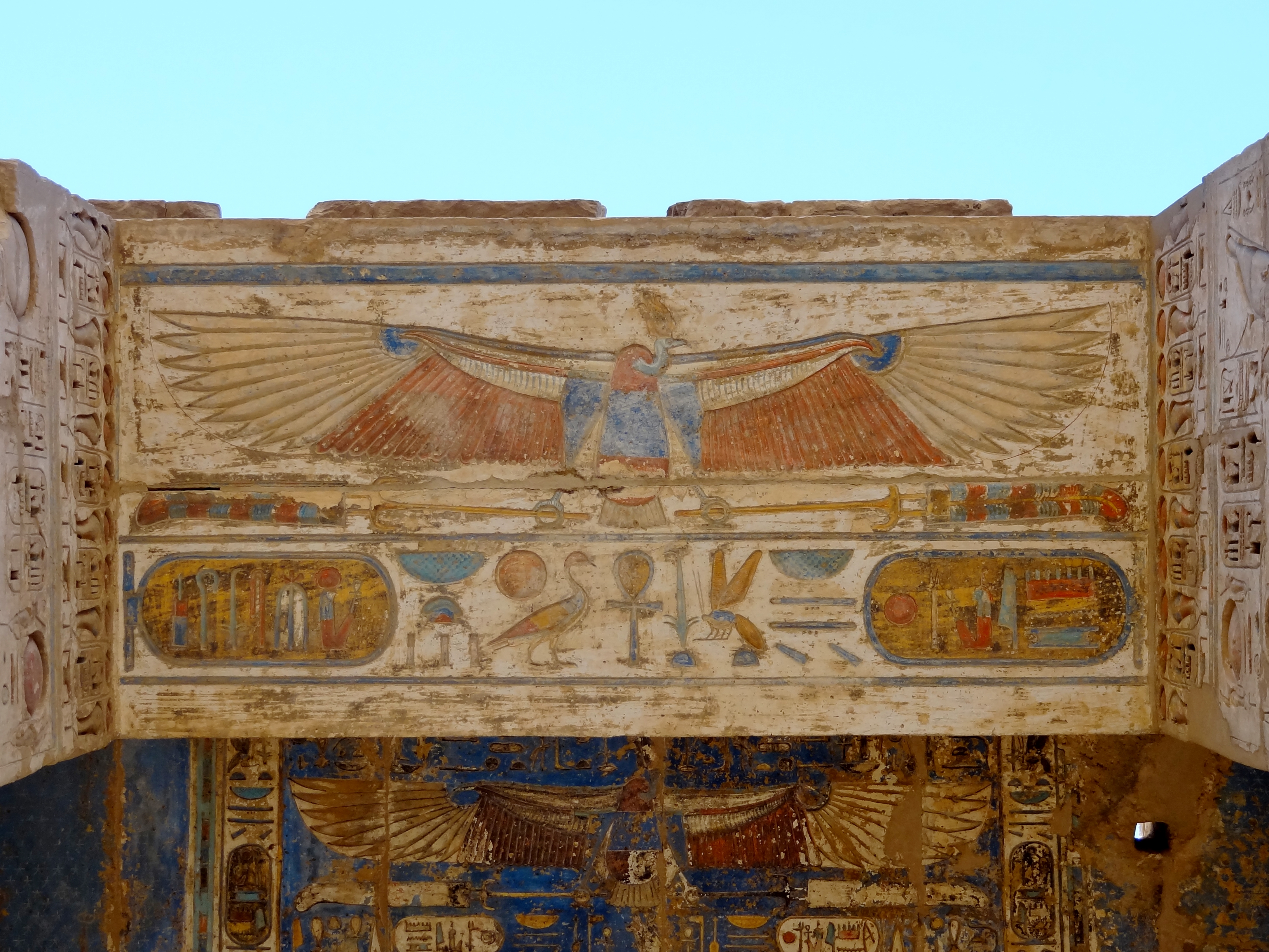 Deckenrelief im Durchgang vom ersten zum zweiten Hof des Totentempels Ramses’ III. in Medinet Habu, Ägypten